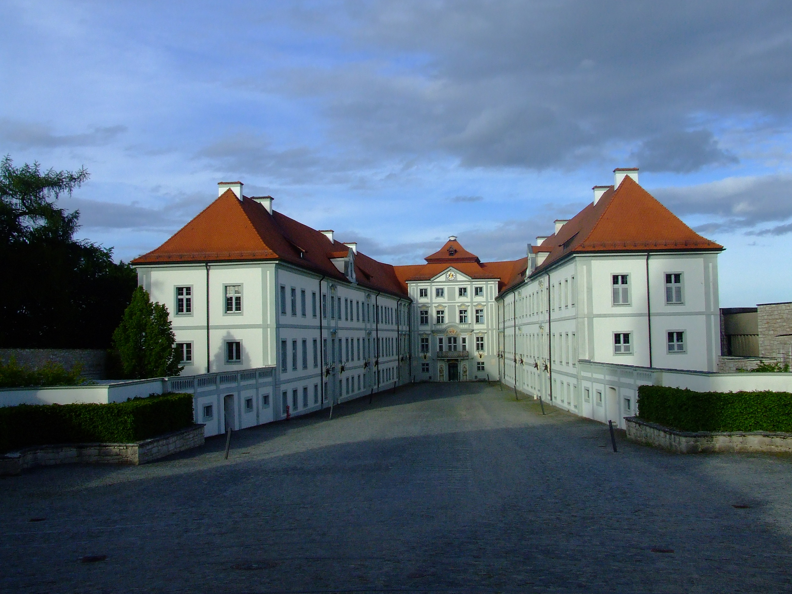 Stadt Beilngries, Kreis Eichstätt, Schloss Hirschberg, Innenhof.